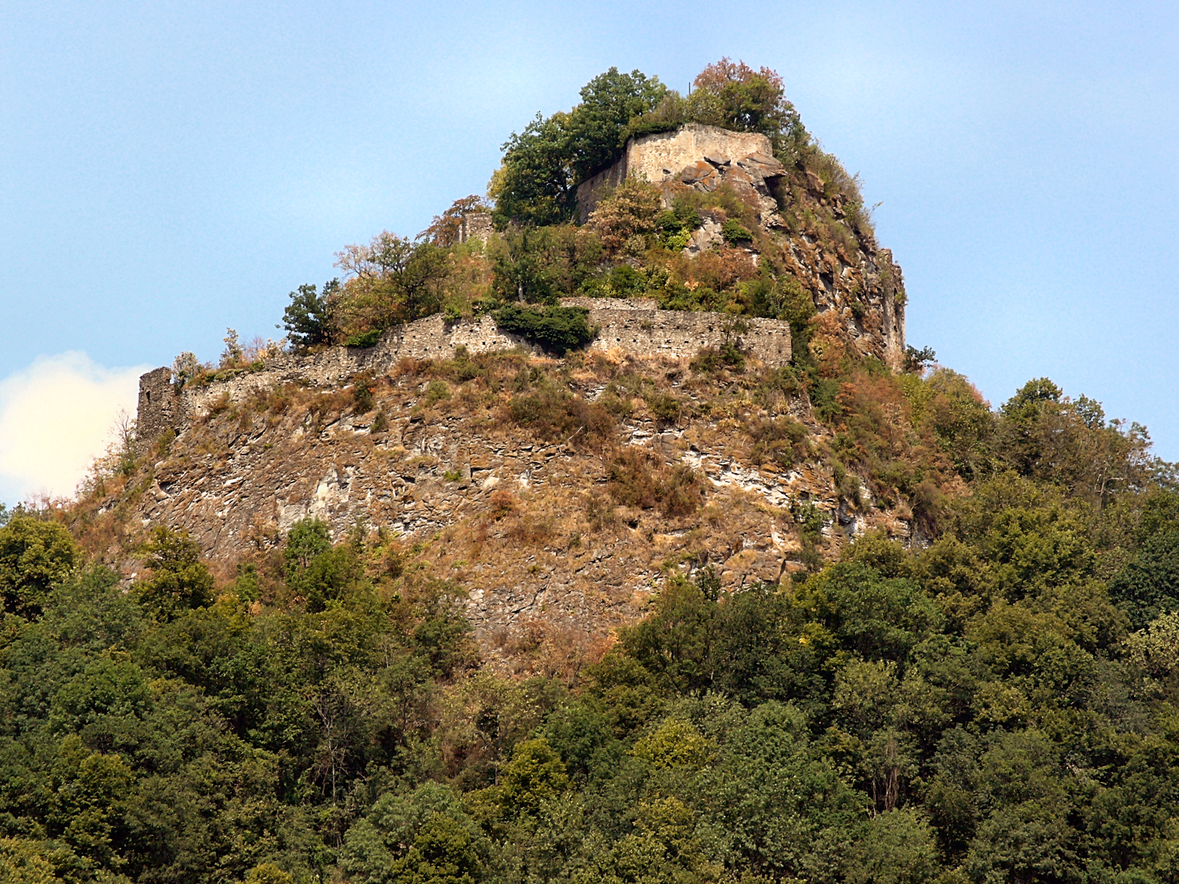 Burg Hohenkrähen von der Dornermühle aus.